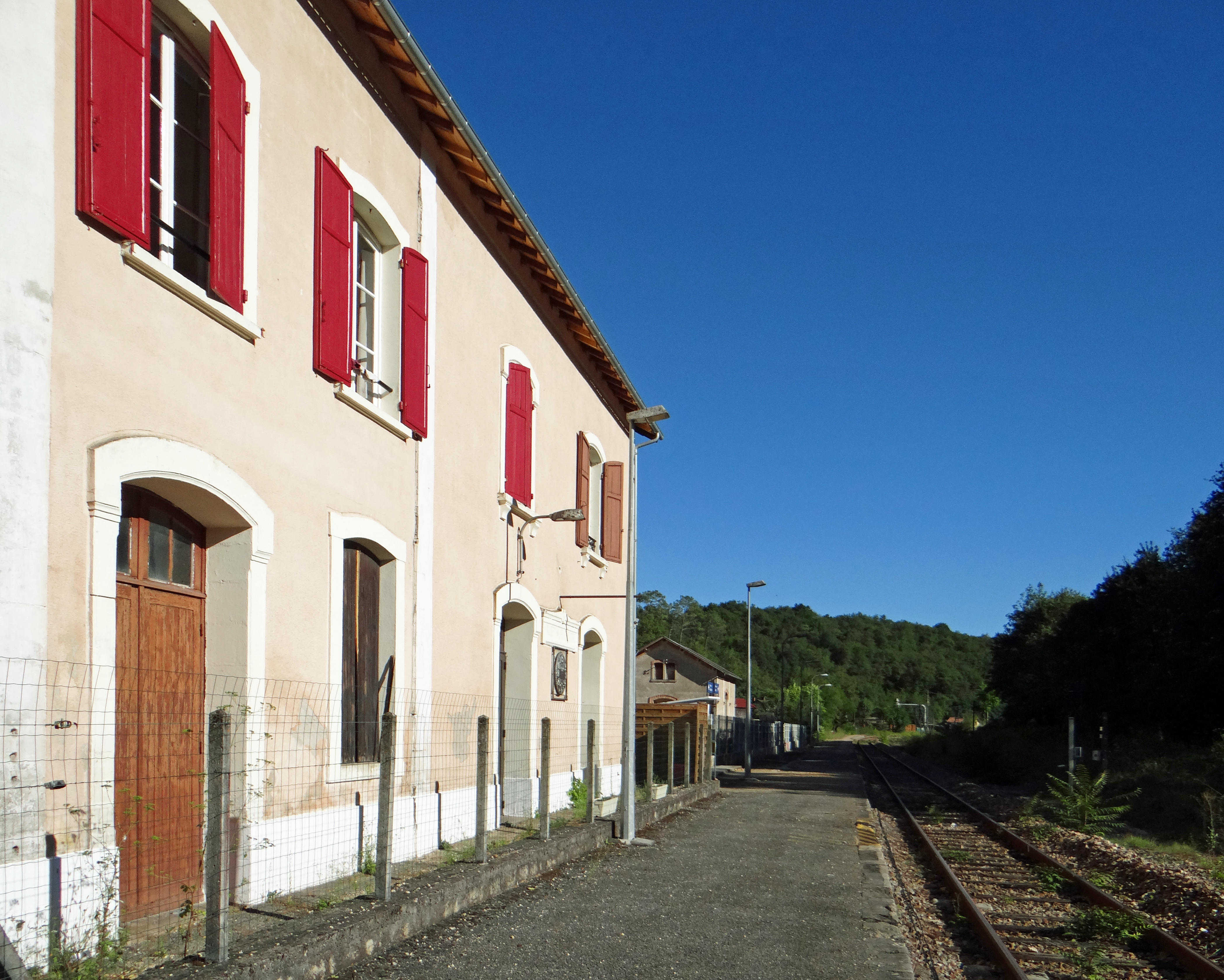 Villefranche-du-Périgord - Ancienne gare